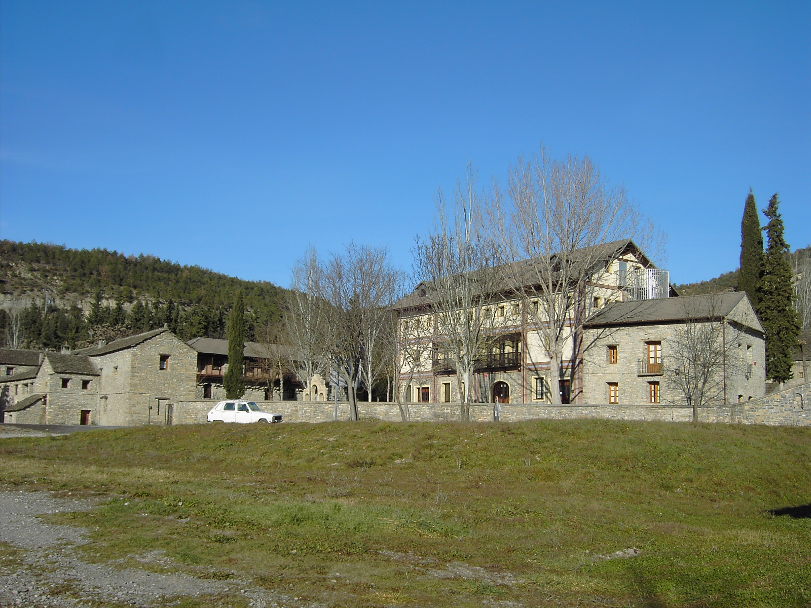 El pueblo recuperado de Morillo de Tou, perteneciente al municipio de Aínsa-Sobrarbe (Huesca).